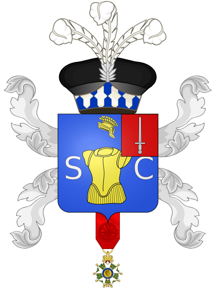 Blason et Ornements extérieurs famille française : Jean-Chrysostôme Calès (baron d'Empire). Blason : D'azur, à la cuirasse à l'antique d'or adextrée d'une S et sénestrée d'un C d'argent et surmontée d'un casque aussi d'or posé au deuxième point en chef ; franc quartier des barons tirés de l'armée. Livrées : les couleurs de l'écu. Ornements extérieurs : Quatre lambrequins d'argent. Toque de velours noir, retroussée de contre-vair, avec porte-aigrette argent, surmonté de trois plumes d'argent.